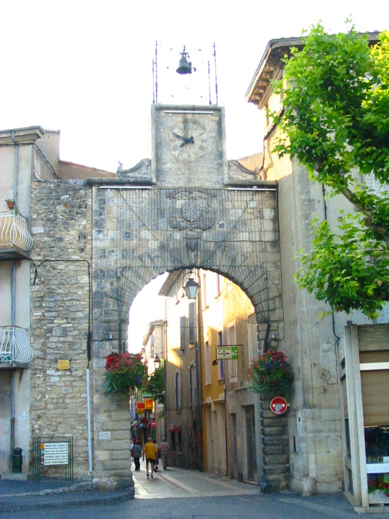 Apt: Die poort van Saignon.